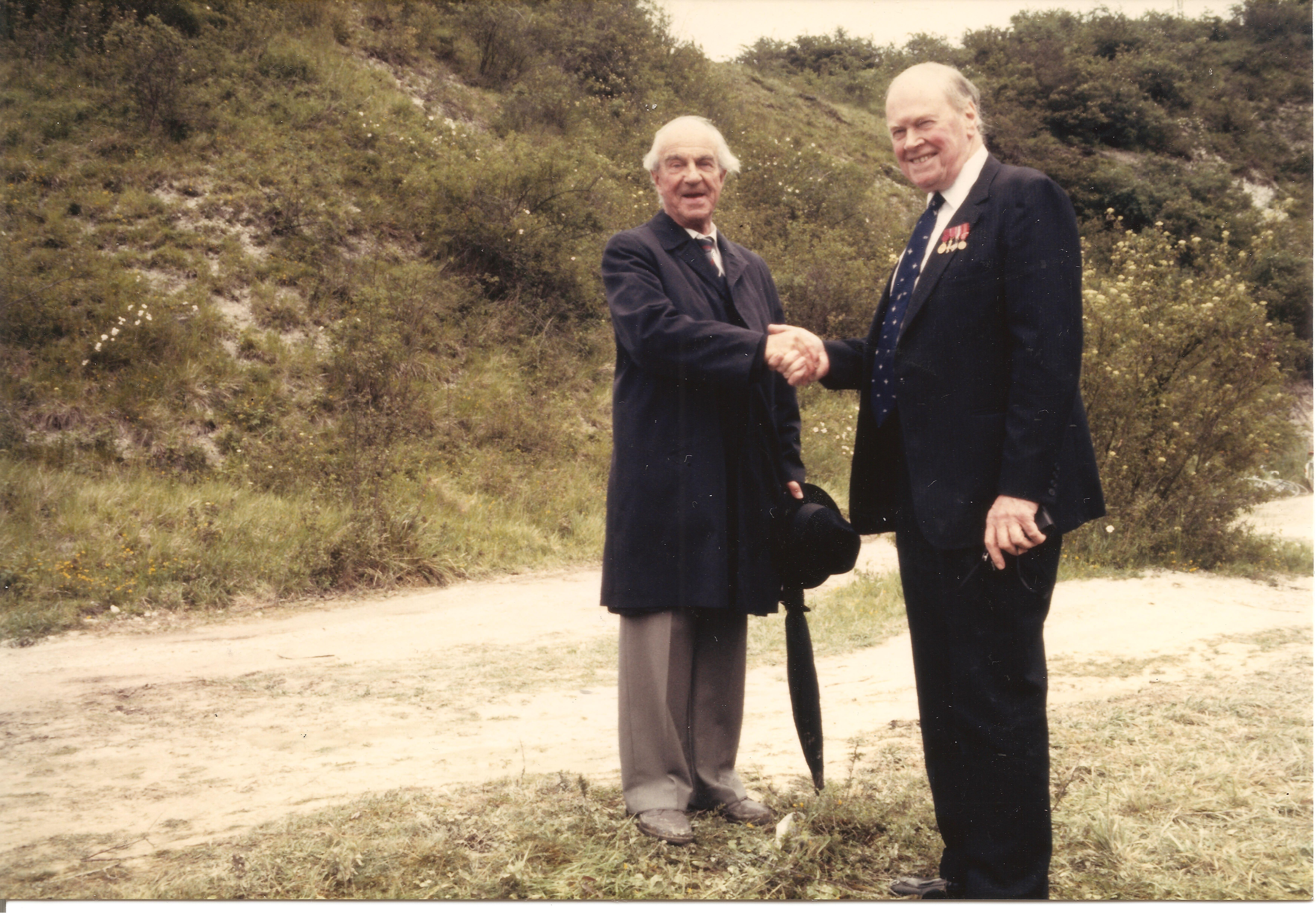 Werner Flos (à gauche) et R.V. Jones se serrent la main lors des portes ouvertes de 1987. [Photo Yves Le Maner]